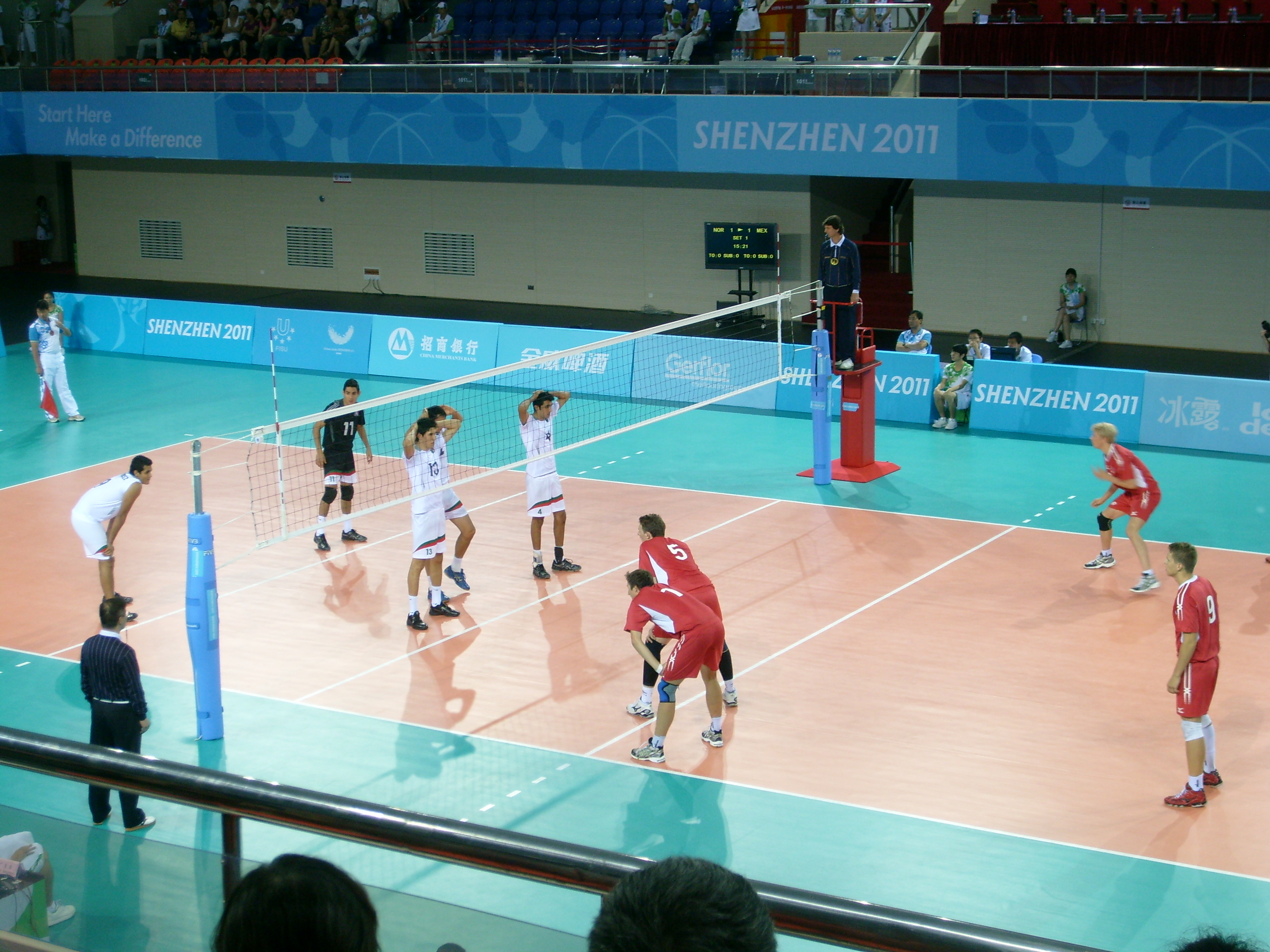 深圳大运会挪威对墨西哥男子排球赛